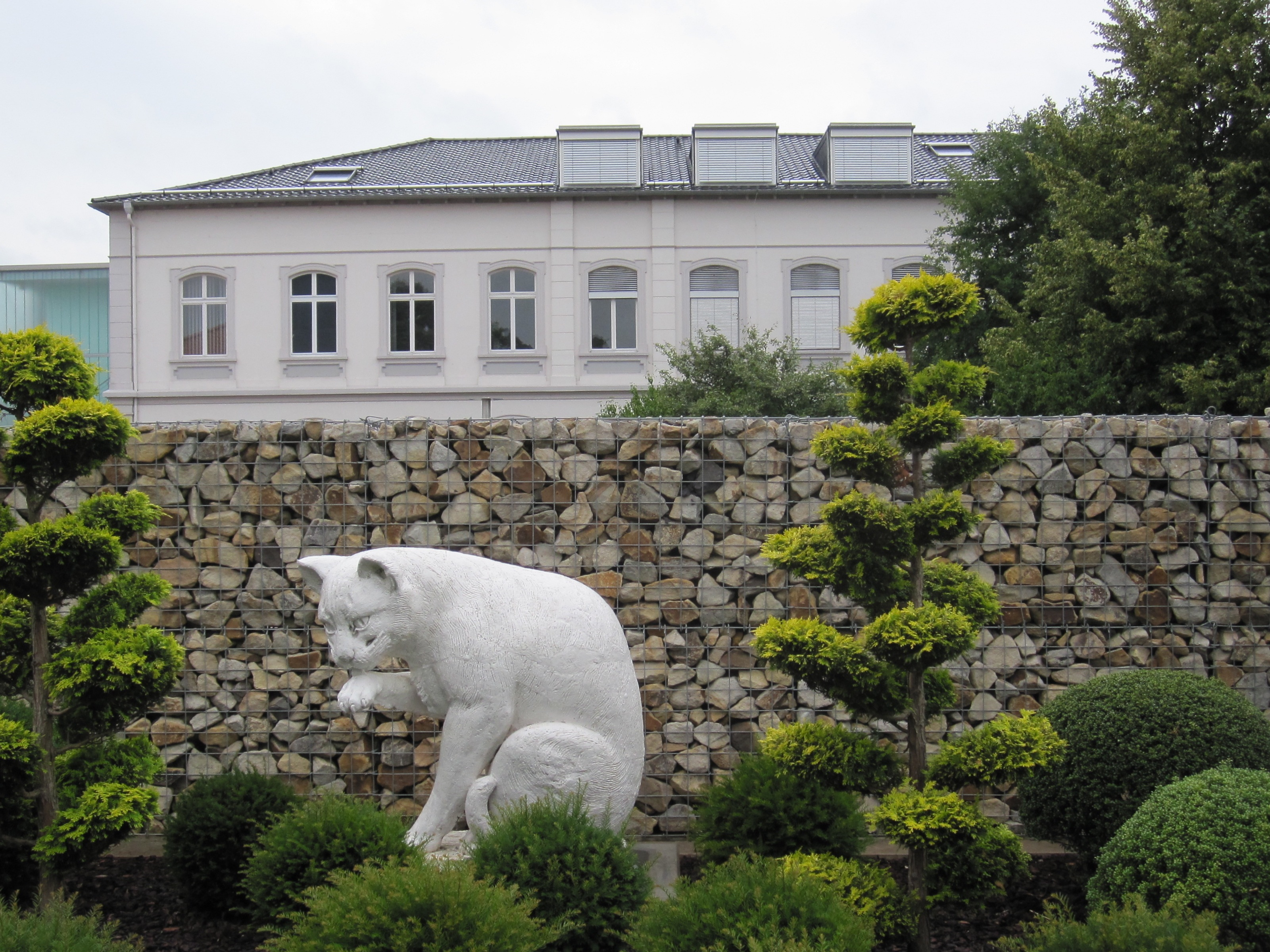 Die Skulptur der Katze steht in der Hoffmannstraße vor dem ehemaligen Verwaltungsgebäude der Stärkefabrik.